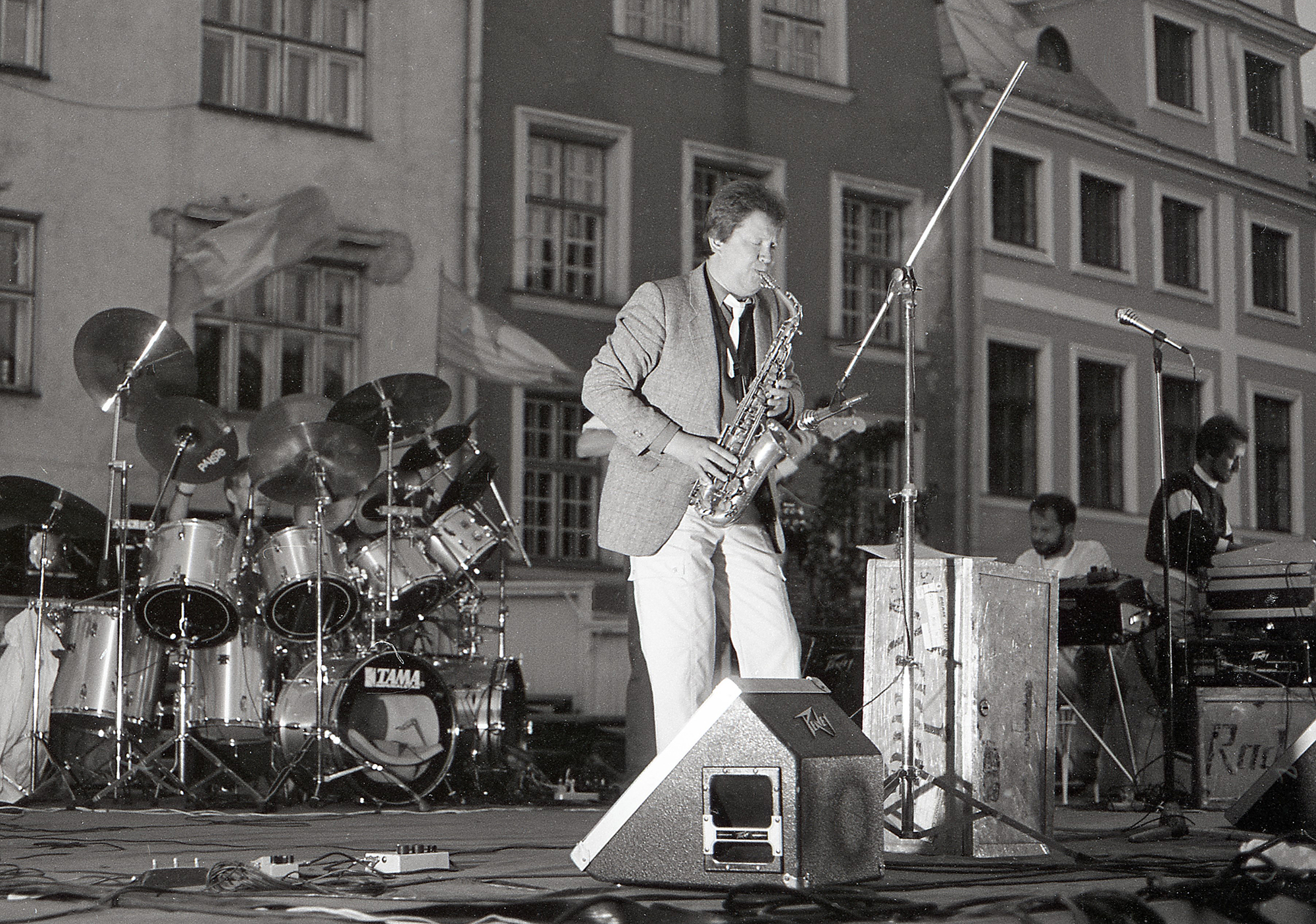 Lembit Saarsalu saksofonist, Raekoja plats Vanalinna Päevadel 86